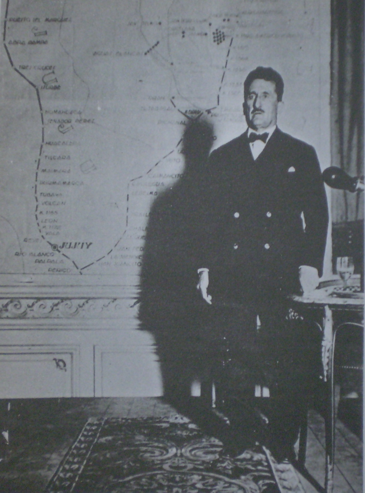 Gral Alonso Baldrich en YPF